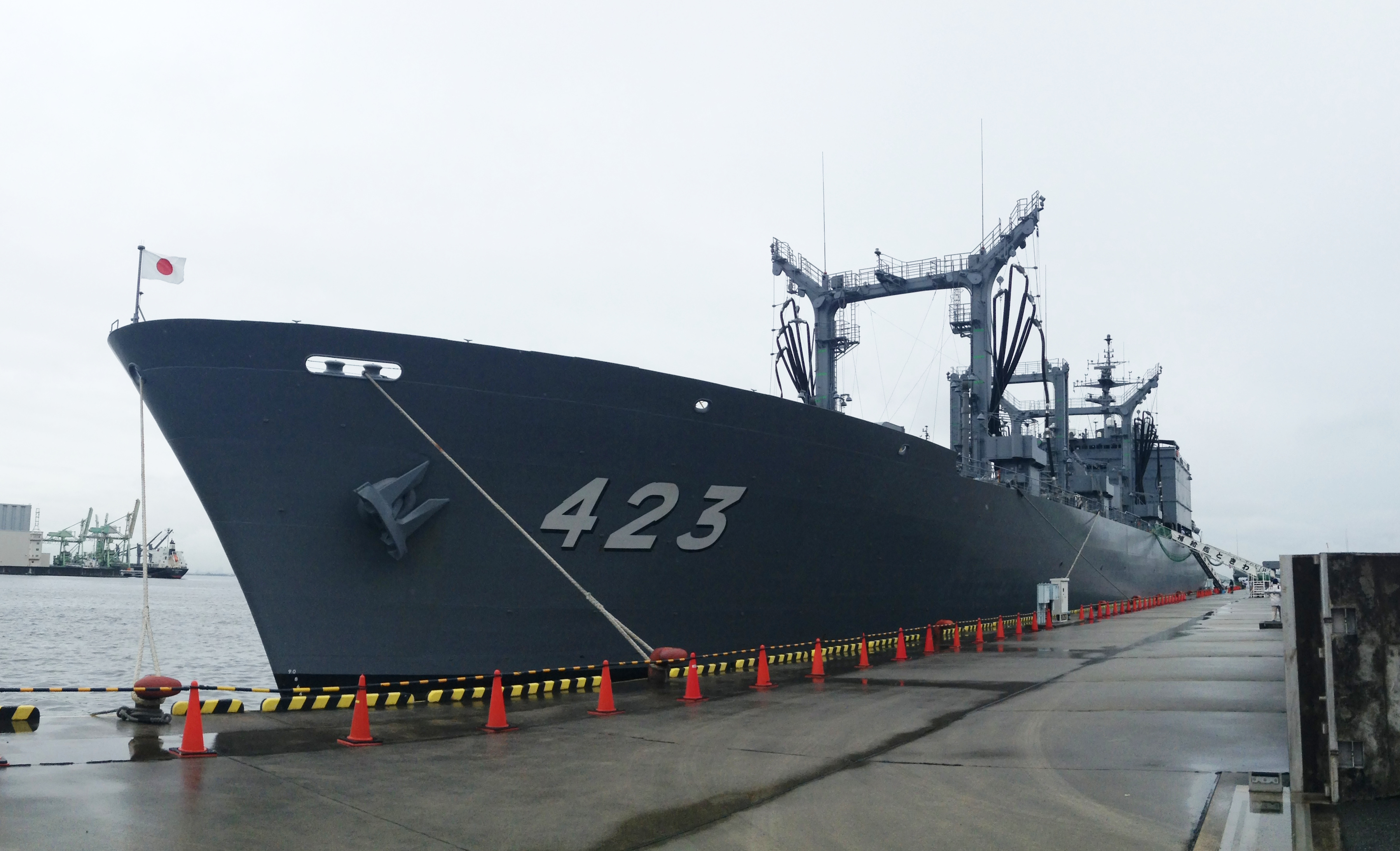 海上自衛隊 とわだ型補給艦 『ときわ』